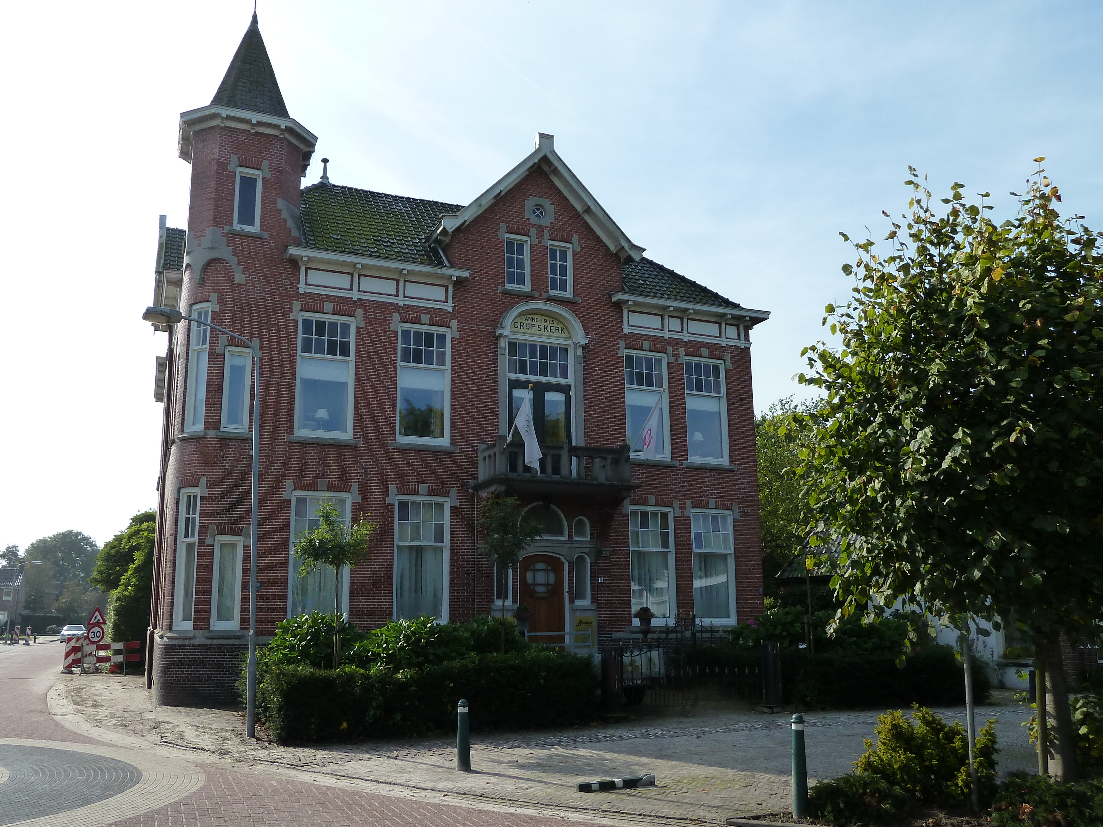 Gemeentehuis van Grijpskerk. Opgeleverd in 1913. Gesloten in 1990 als gemeentehuis toen Grijpskerk opging in de fusiegemeente Zuidhorn. Ontwerp door architect Klaas Siekman uit Zuidhorn. Stijl verwant aan het rationalisme. Rijksmonument.